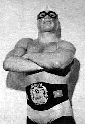 Dory Funk Jr. en une du volume 1 du n.1 du journal de catch Wrestling News du 15 juin 1972. Cowboy Bill Watts, Parente & Hart et Danny Little Bear sont sur l'image mais pas utilisables.